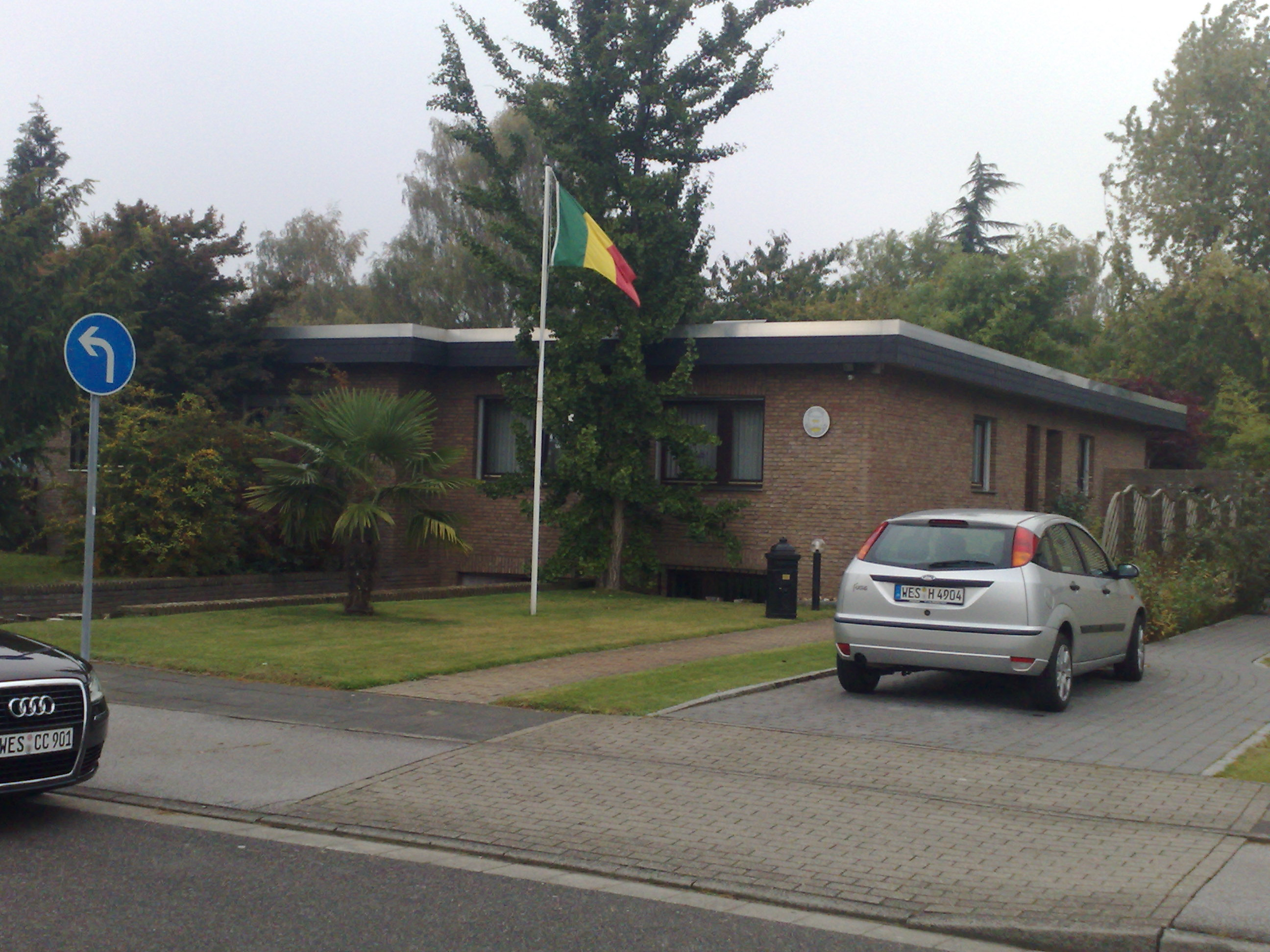 Konsulat der Republik Mali in Kamp-Lintfort, Deutschland